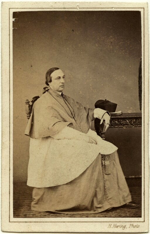 Photograph by Henry Hering